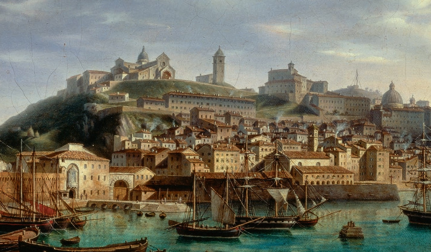 particolare del dipinto "Veduta del porto di Ancona" di Barnaba Mariotti